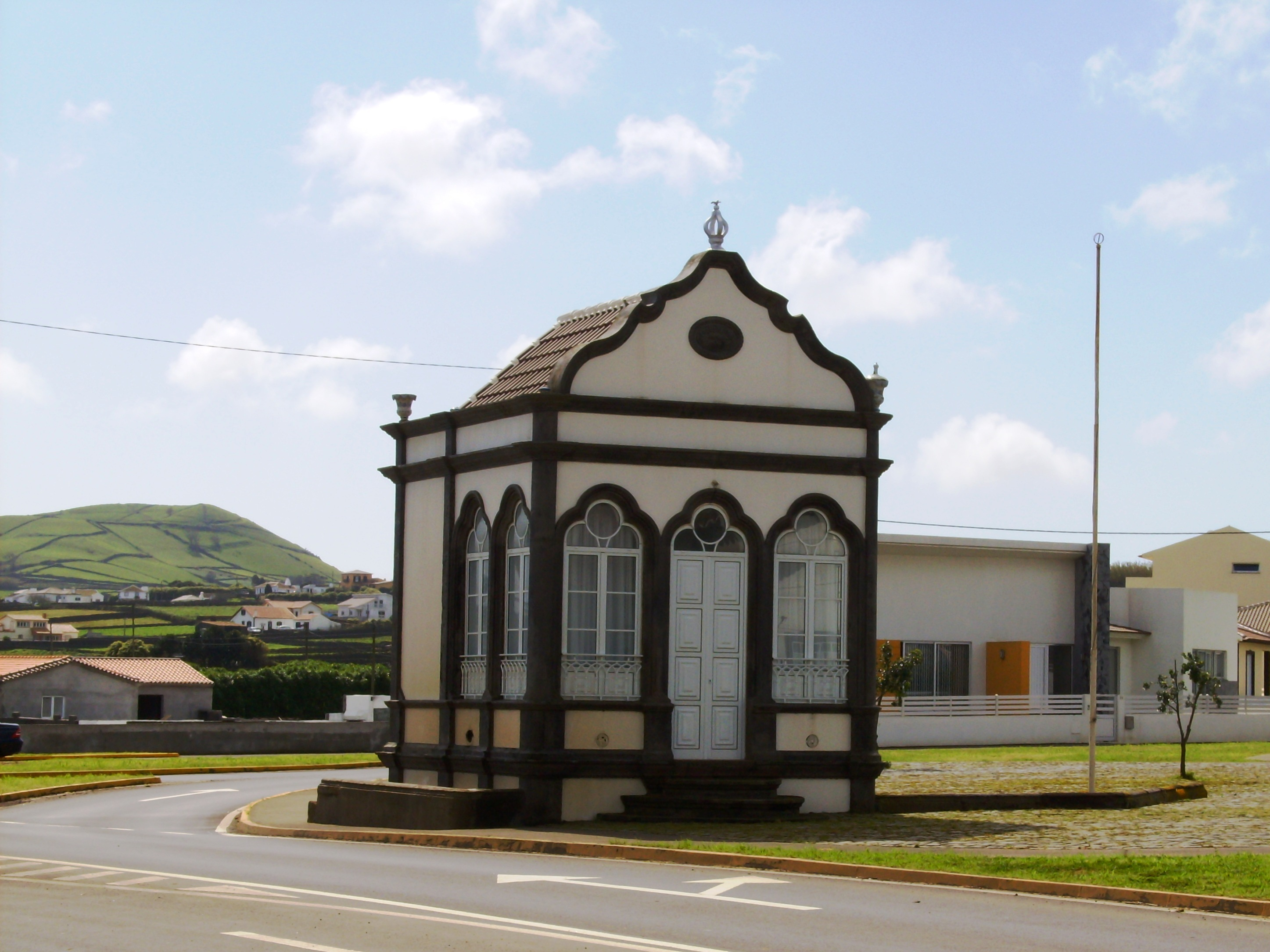 Império do Divino Espírito Santo da Tronqueira, Cabo da Praia, Praia da Vitória, ilha Terceira, Açores.